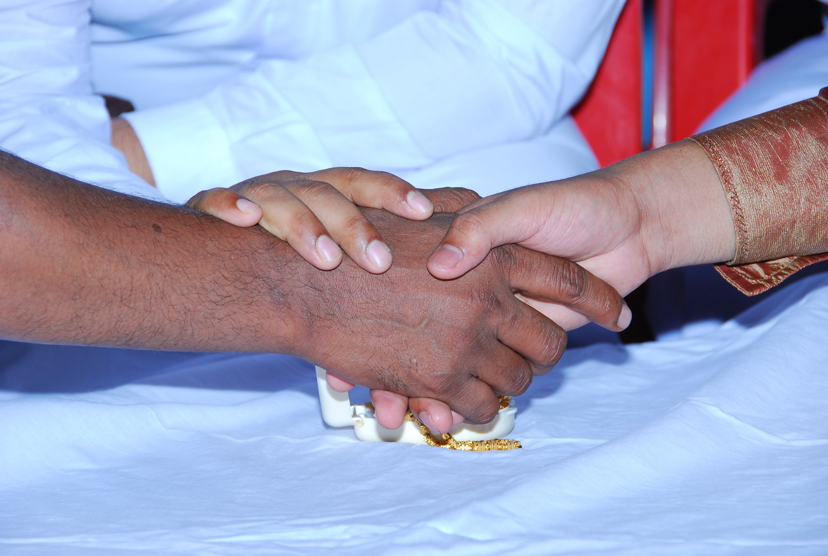 നിക്കാഹിന്റെ സമയത്ത് വരന്റെയും വധുവിന്റെ പിതാവിന്റെയും കൈകൾ ചേർത്ത് പിടിച്ചു പ്രതിജ്ഞ ചെയ്യുന്ന രംഗം.